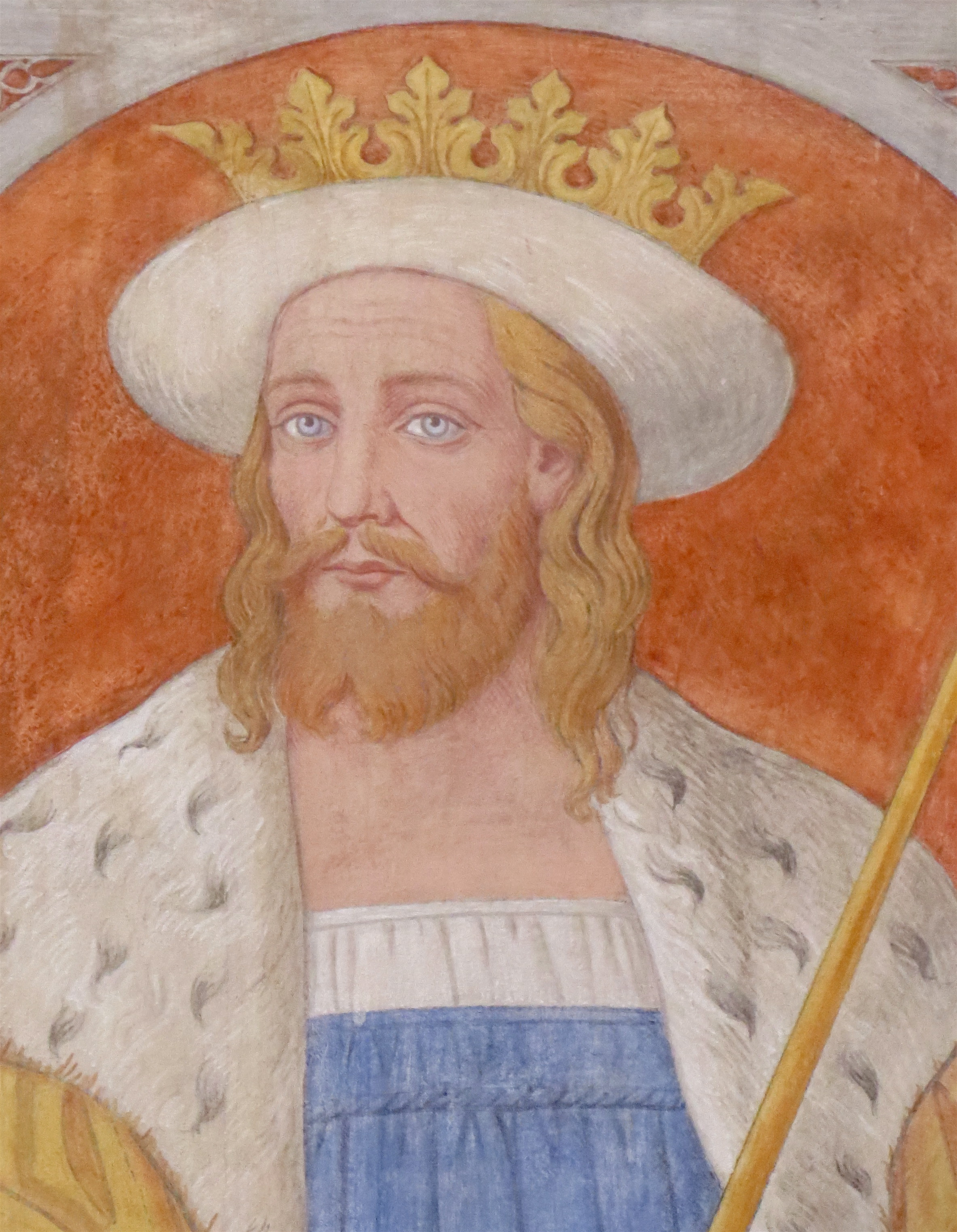 Svend Estridsen, kalkmaleri fra 1500-tallet i Roskilde Domkirke, Sjælland